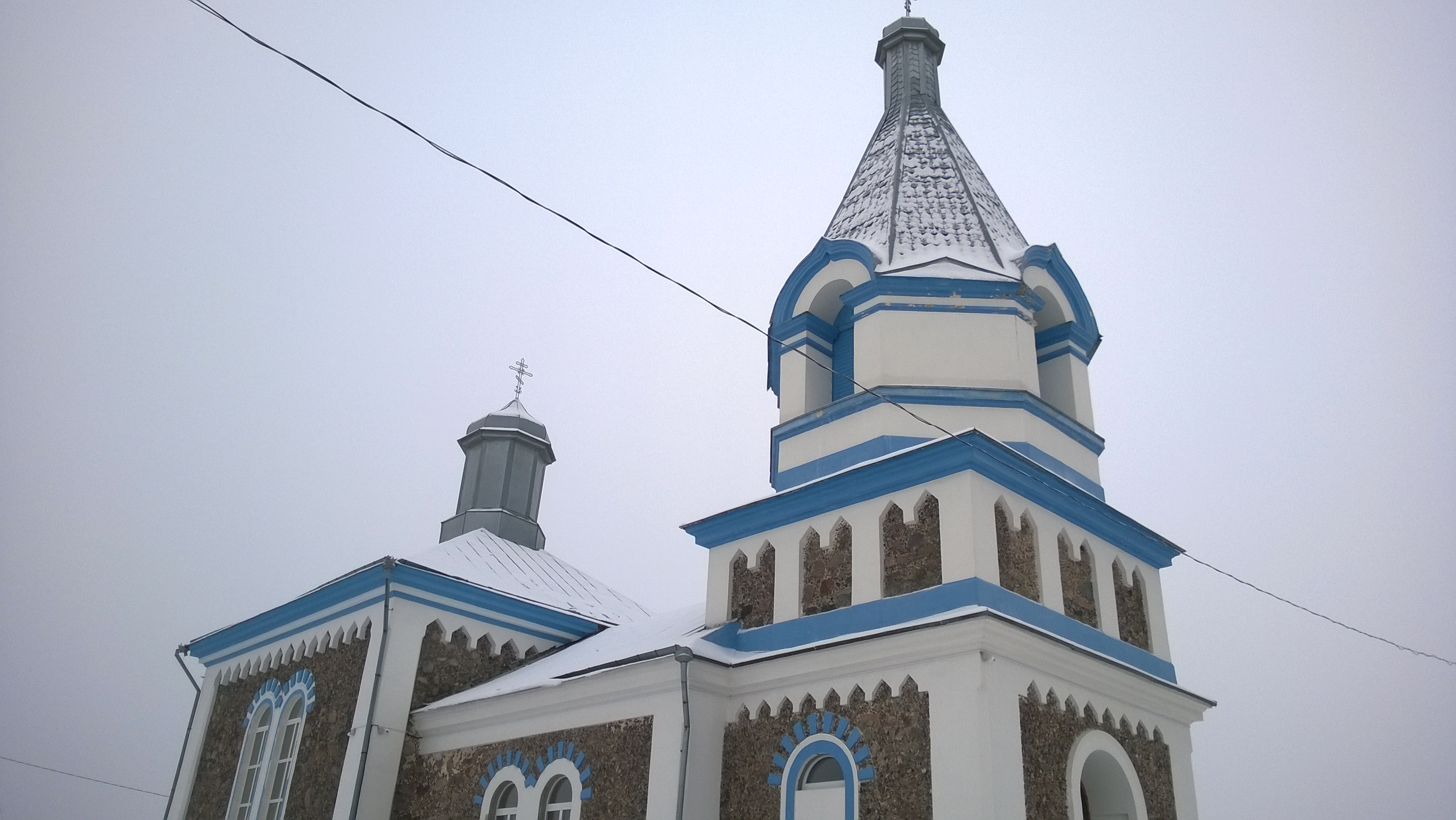 Kapcioŭka, Belarus